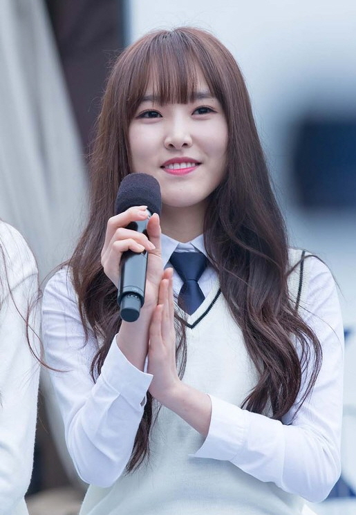 16.04.09 박지윤의 가요광장_유주 직찍